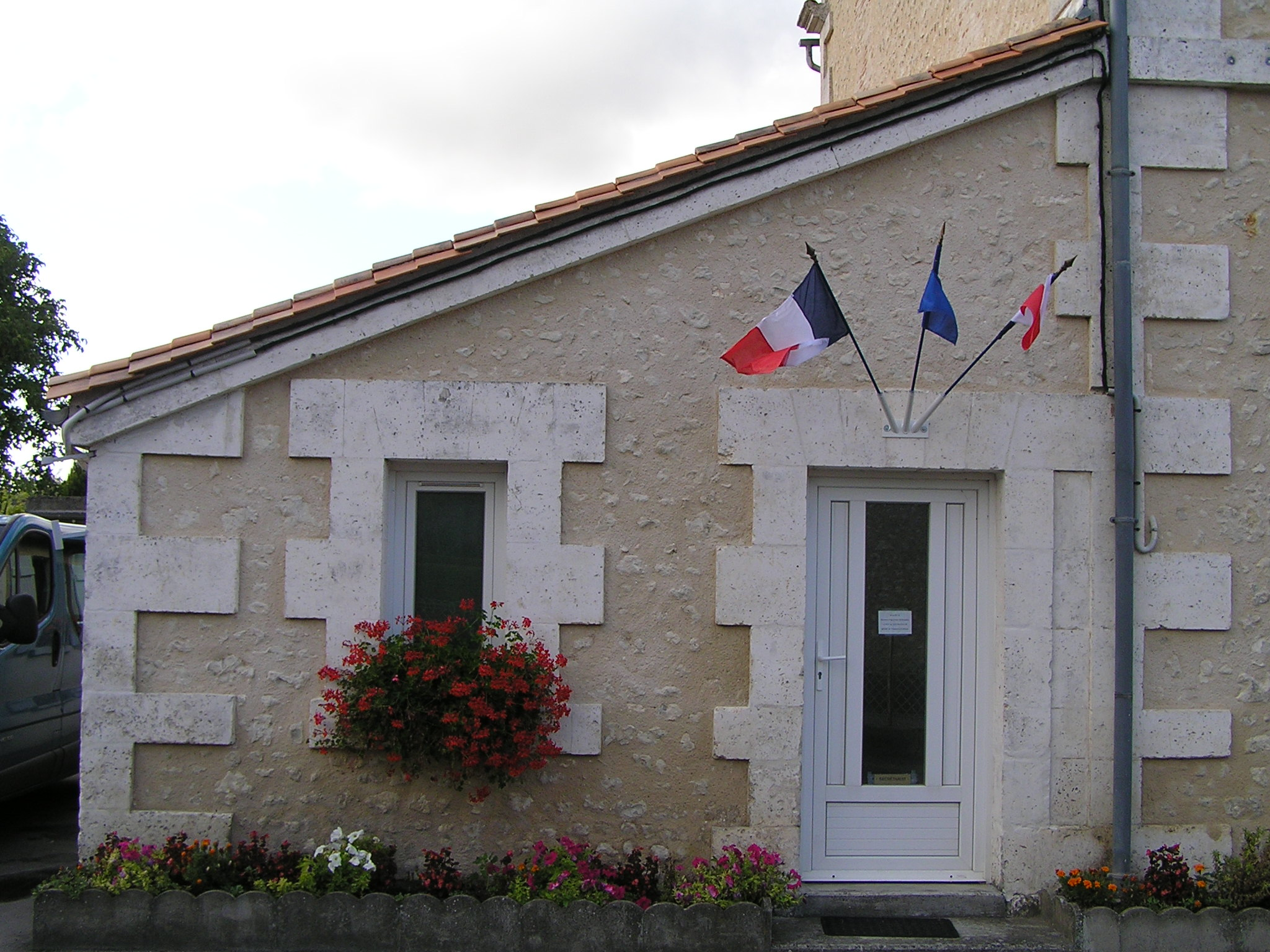 mairie de Saint-Léger (Charente)